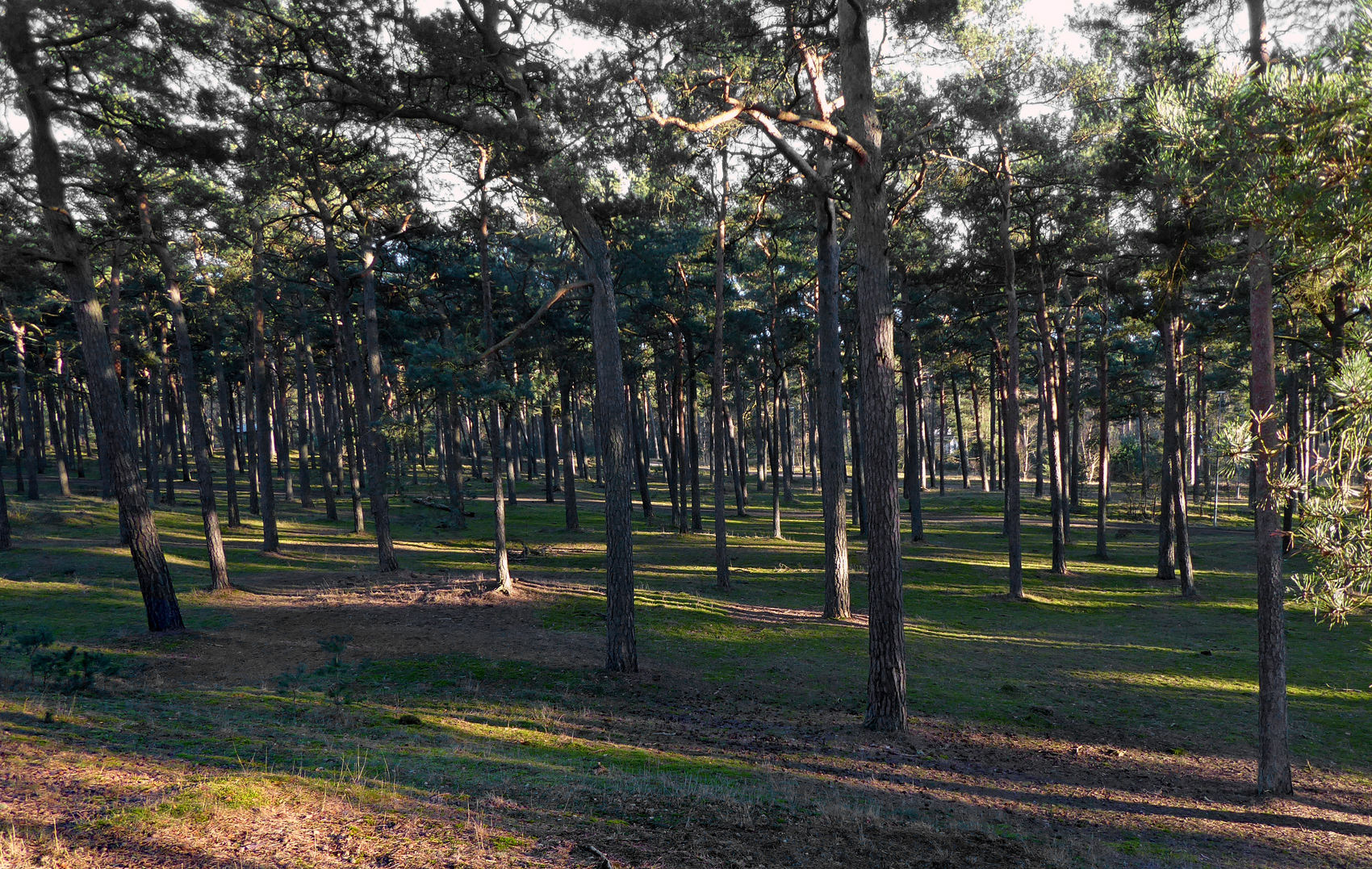 Ystads Sandskog i mars 2019.